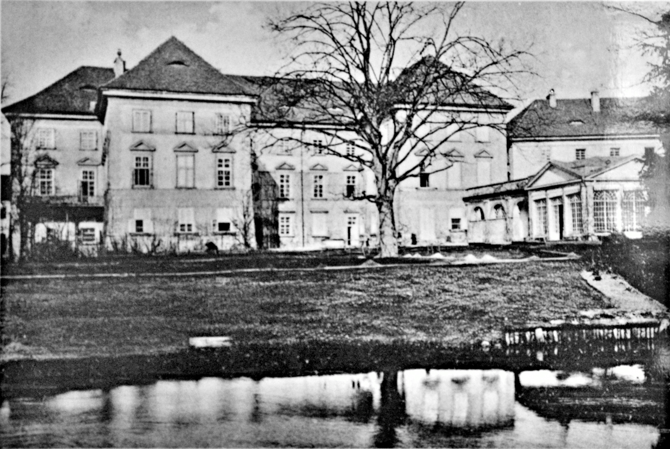 Mimoňský zámek v roce 1935